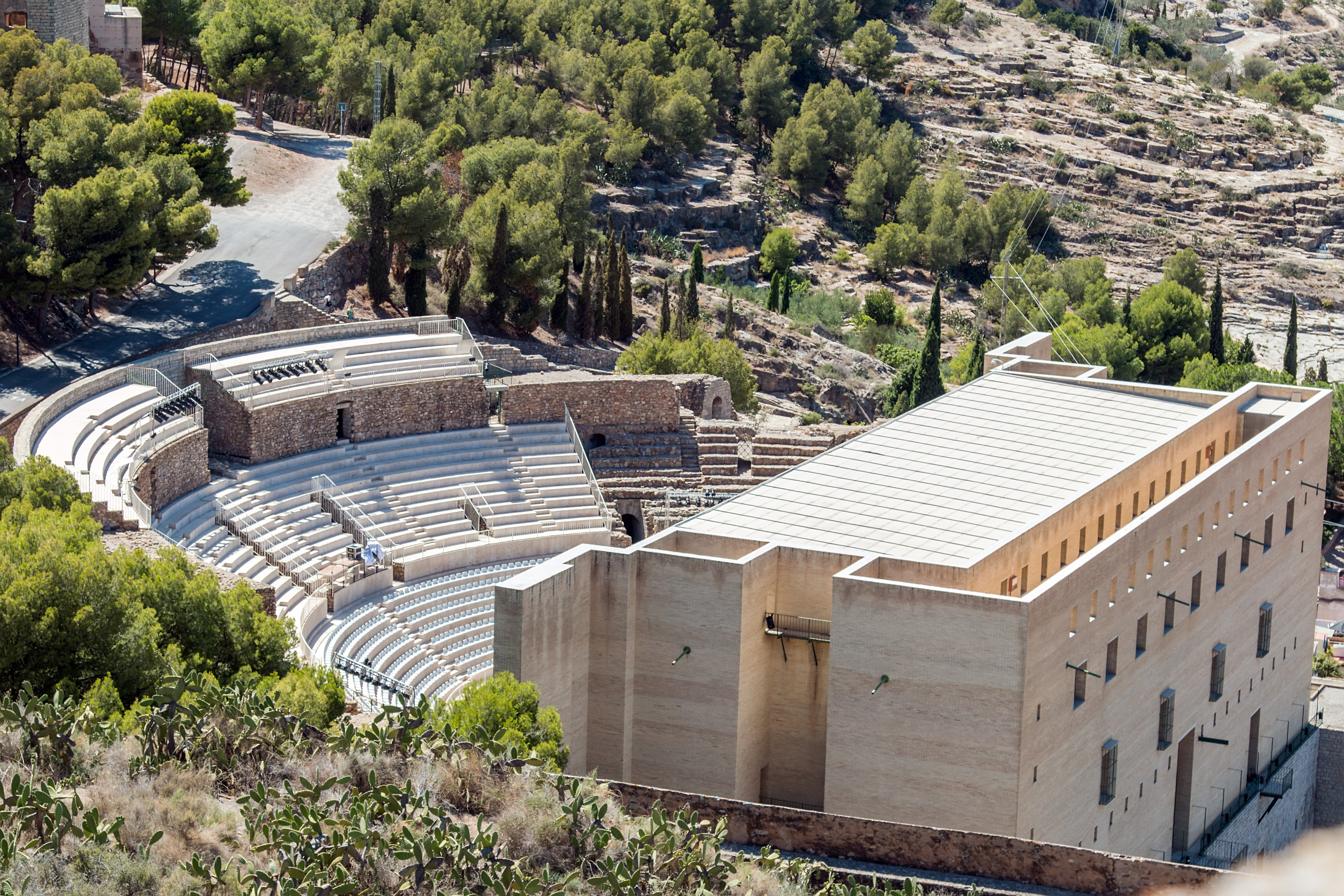 Вид на Римский театр с площади d'Almenara.